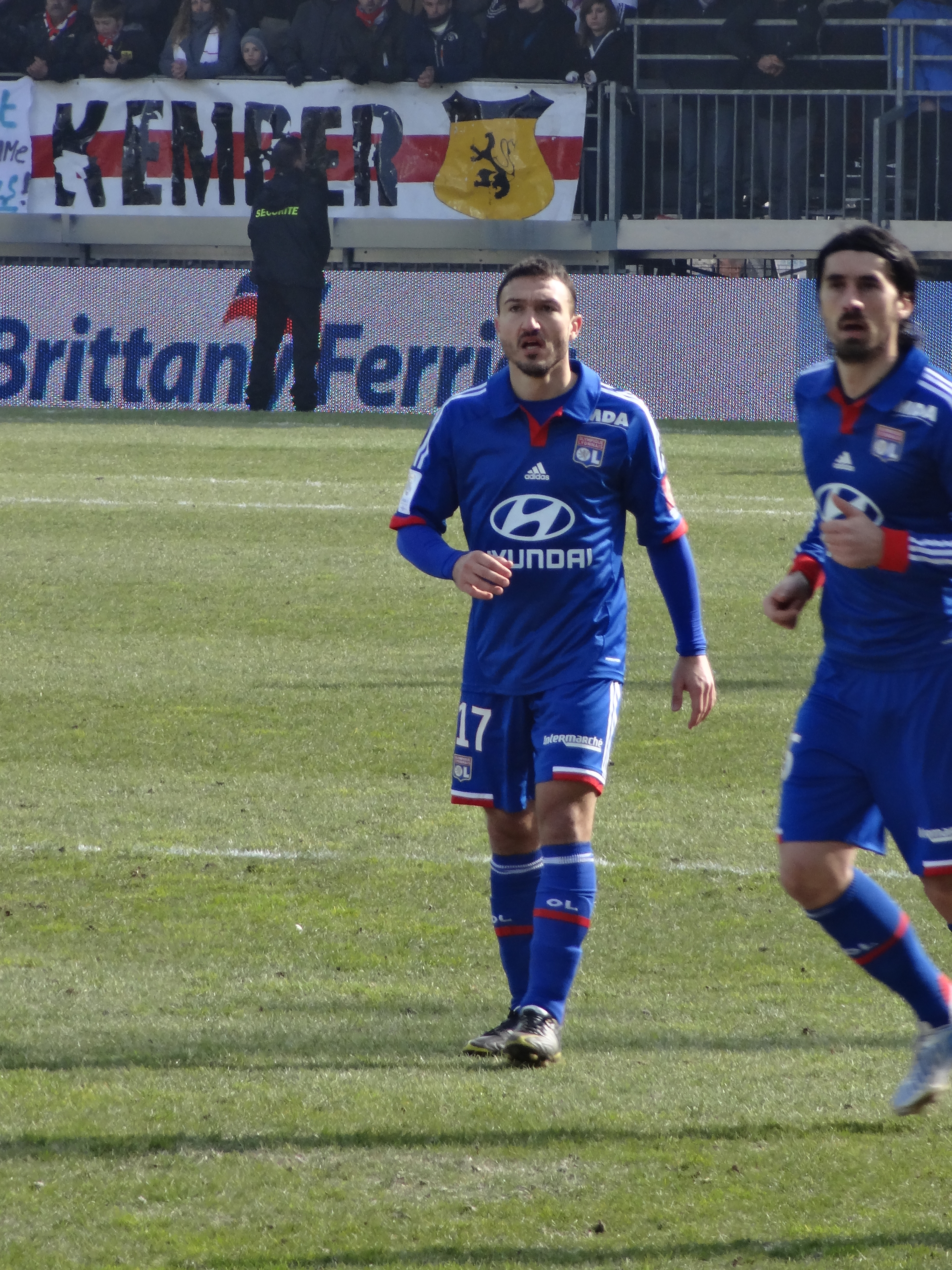 Match de football (Ligue 1) entre le Stade brestois 29 et l'Olympique lyonnais, le 3 mars 2013